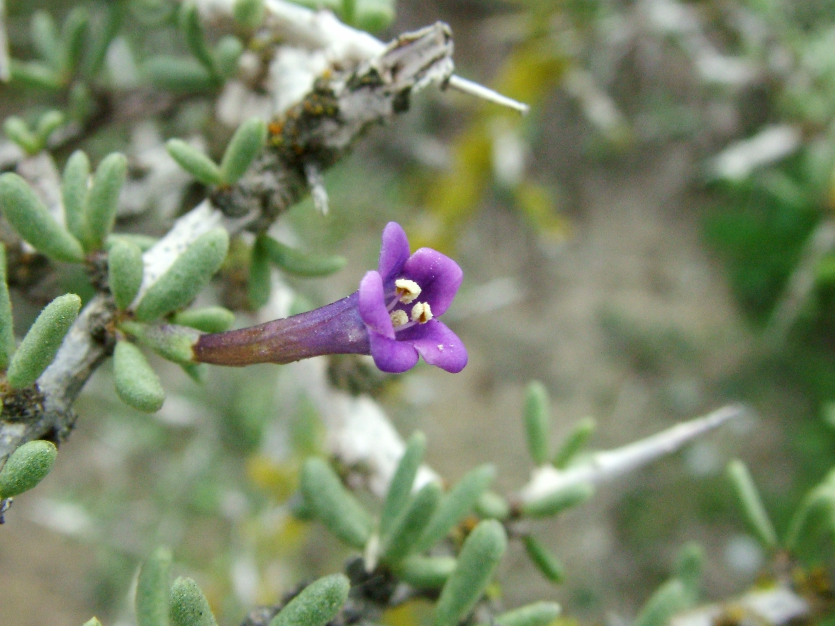 Lycium intrincatum